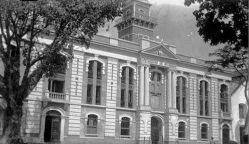 Fachada del Edificio San Ignacio de la Universidad de Antioquia, tomada el 01-01-1928, Medellín, Colombia.